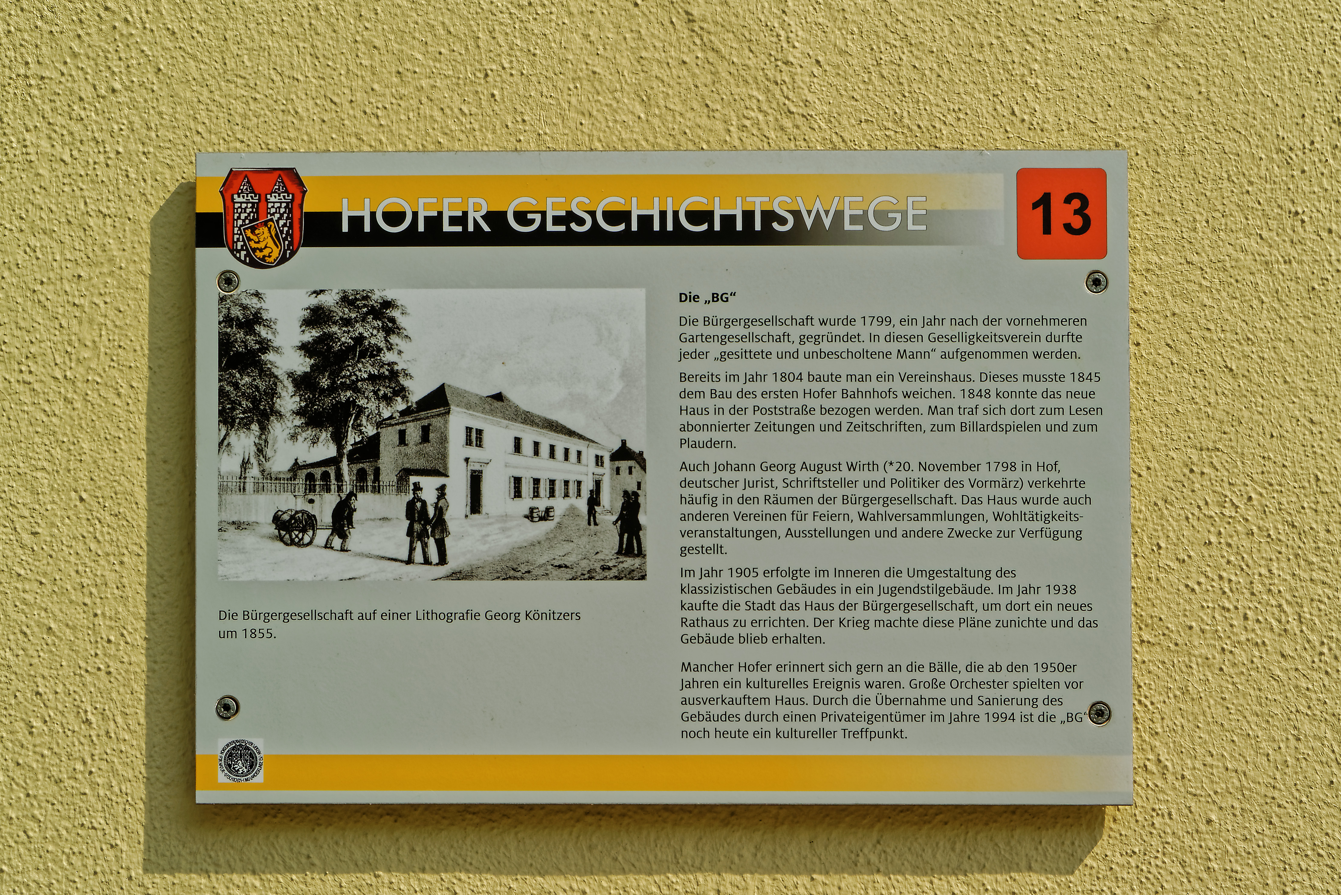 Poststraße 6, Vereinshaus der Bürgergesellschaft, in Hof/Saale mit Denkmal-Nr. D-4-64-000-256 Mehrfach gegliederter zweigeschossiger Walmdachbau, 1848, rückseitig Saalbau, zweigeschossig über hohem Untergeschoss mit exedraförmigem Bühnenhaus, seitlich Zugang über geschlossene Holzveranda, Jugendstil 1900–1914 (Detail: Infotafel Nr. 13 Hofer Geschichtsweg, Die "BG")This is a photograph of an architectural monument.